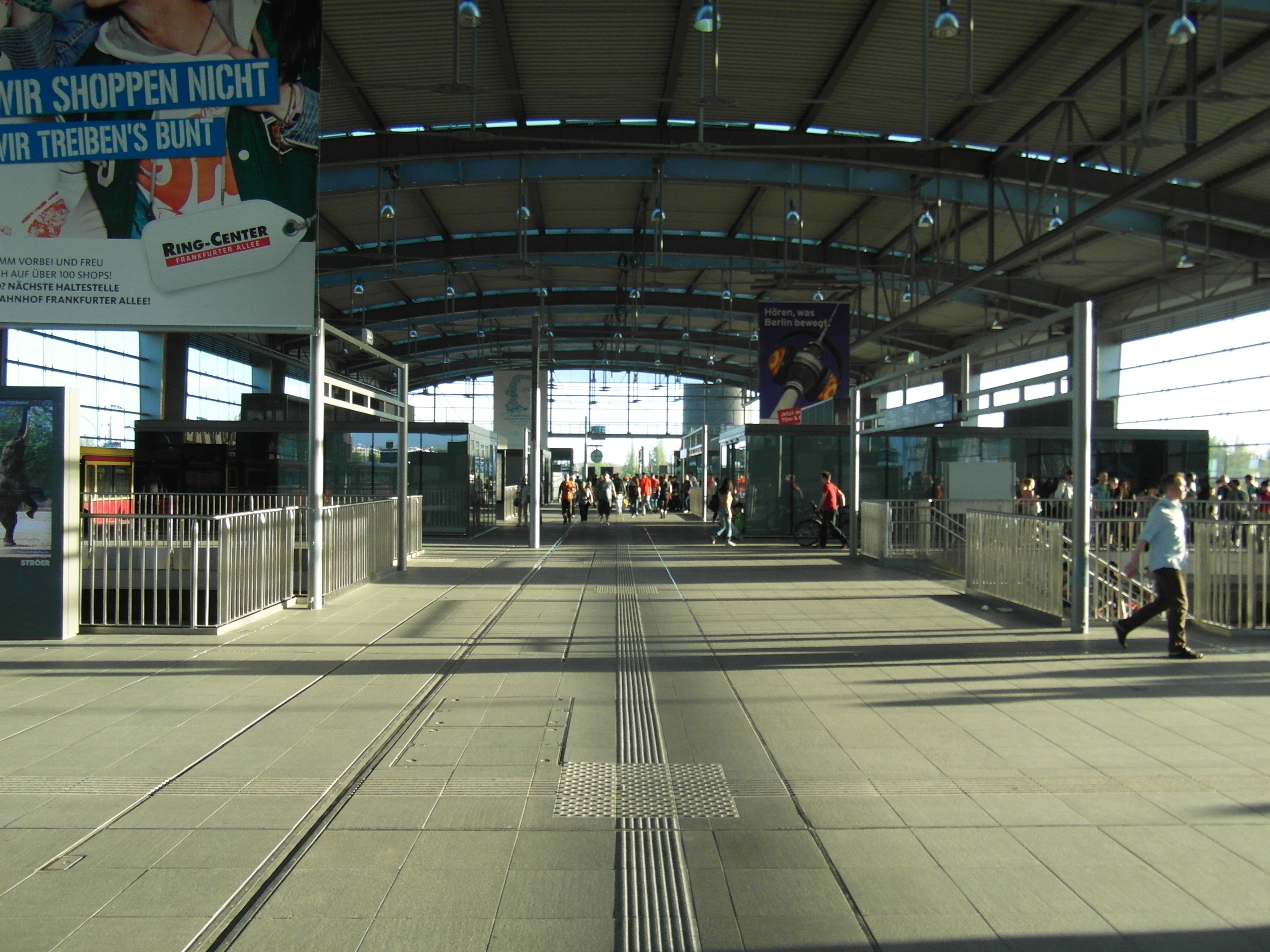 Berlin - S-Bahnhof Ostkreuz - Neue Ringbahnhalle - Stand 04/2012